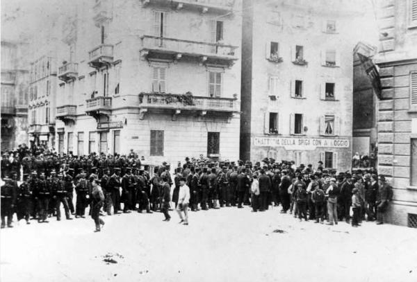 Moti di Milano del 1898, detti anche "Protesta dello stomaco", corso di Porta Venezia con le truppe schierate